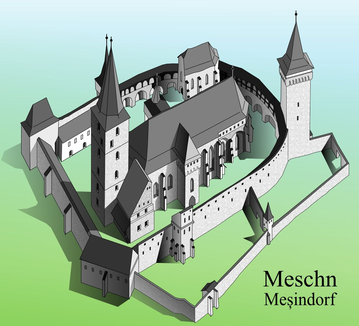 Biserica fortificata din Mosna